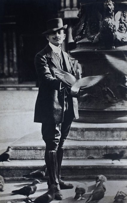 Jindřich Bišický (1889 - 1949), Český válečný fotograf.